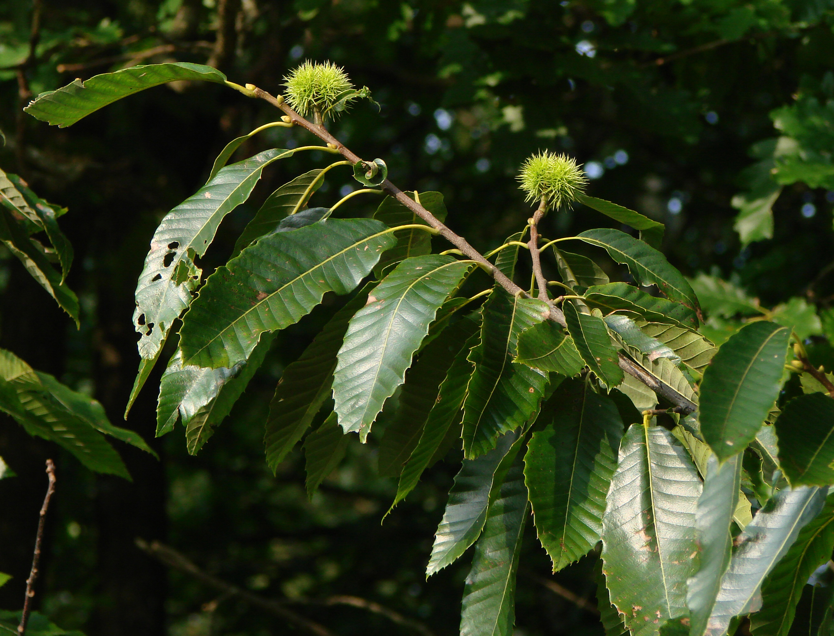 Remplacé par une meilleure version